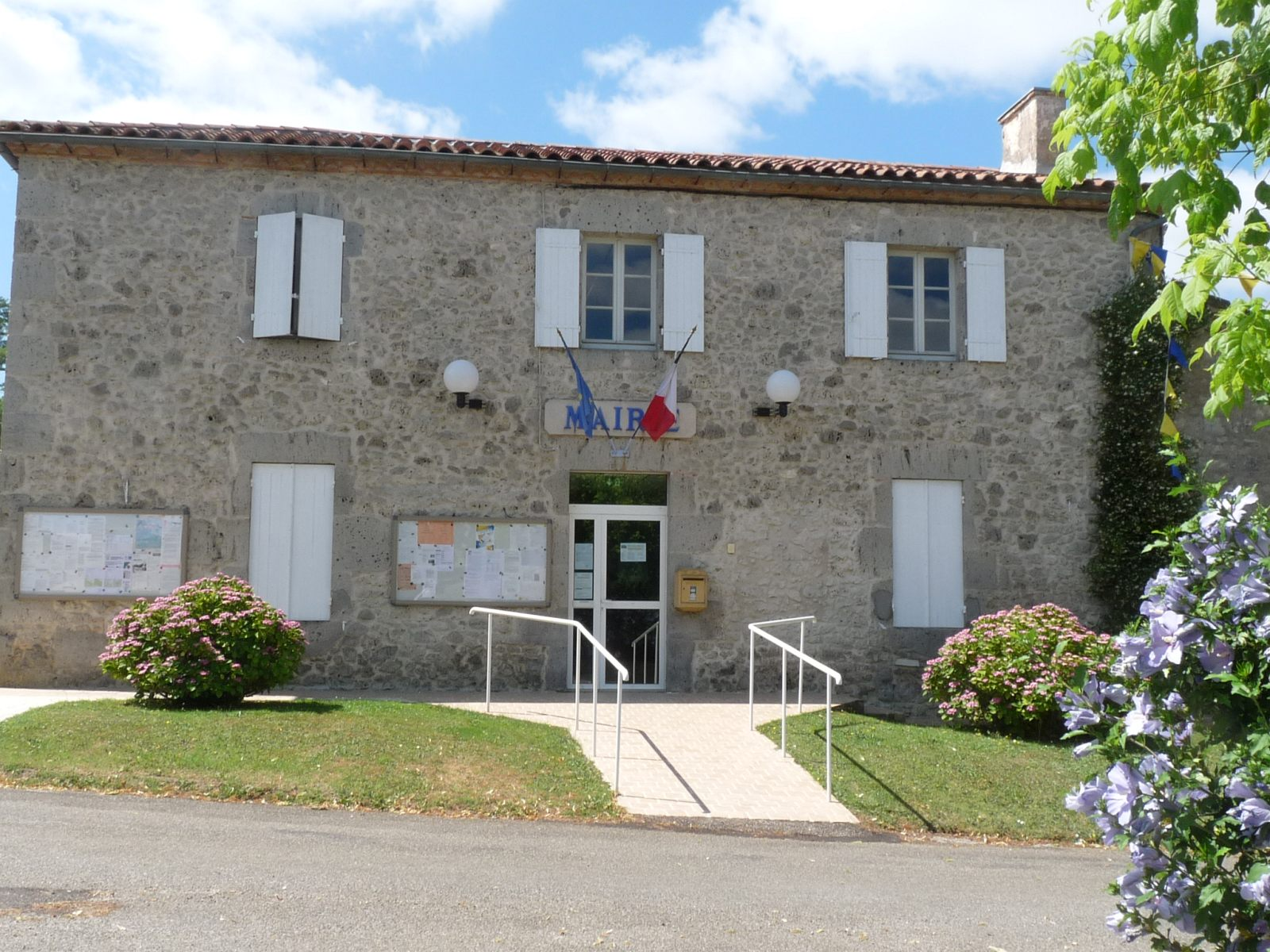 Mairie de La Réunion (Mirande), Lot-et-Garonne, France